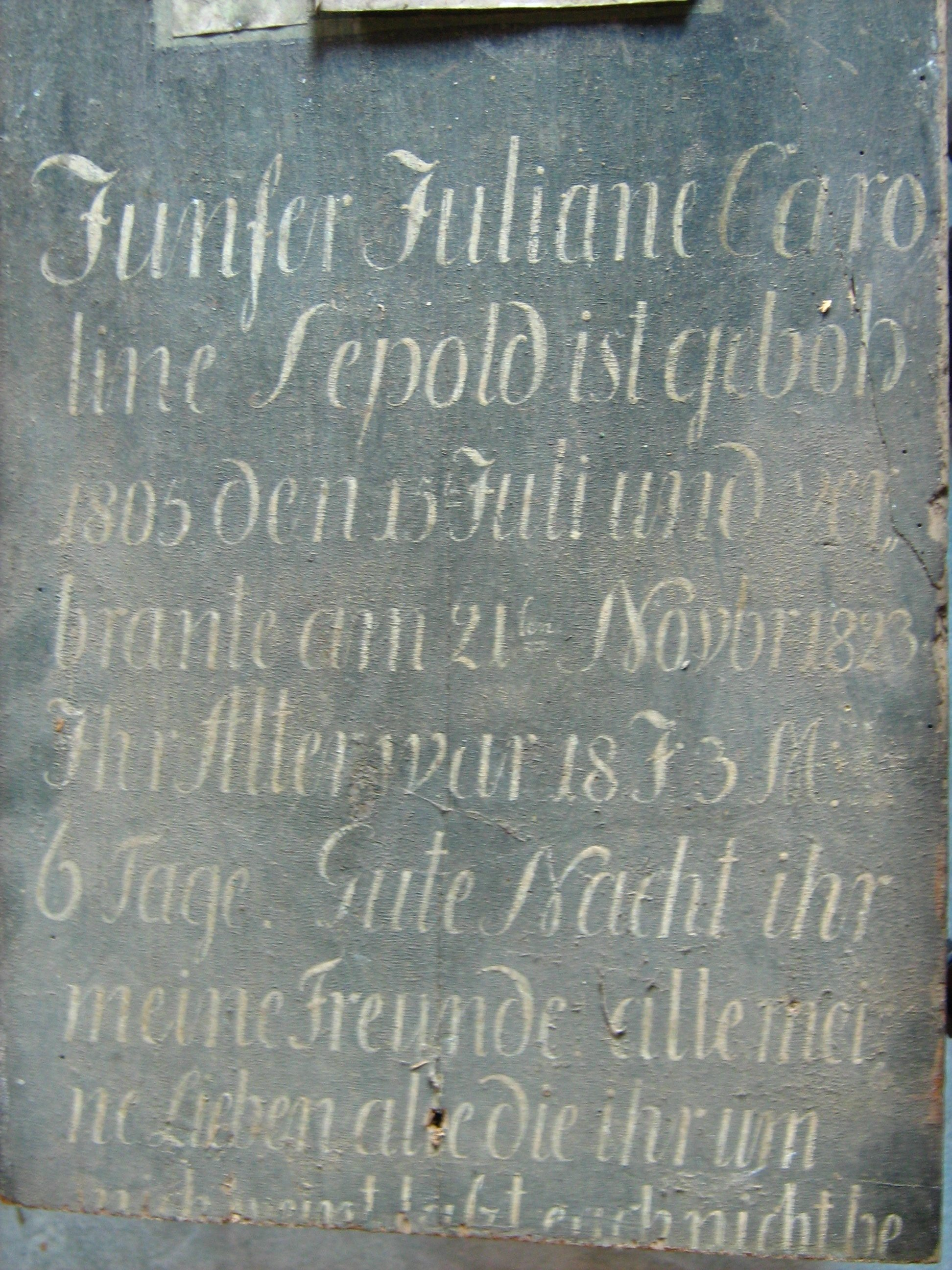 Holztafel einer Verstorbenen des Brandes im Gutshaus 1823, Krügersdorf, Beeskow, Brandenburg. Die hölzerne Platte (Grabplatte?) von 1823 ist heute im Besitz der hiesigen Kirche.